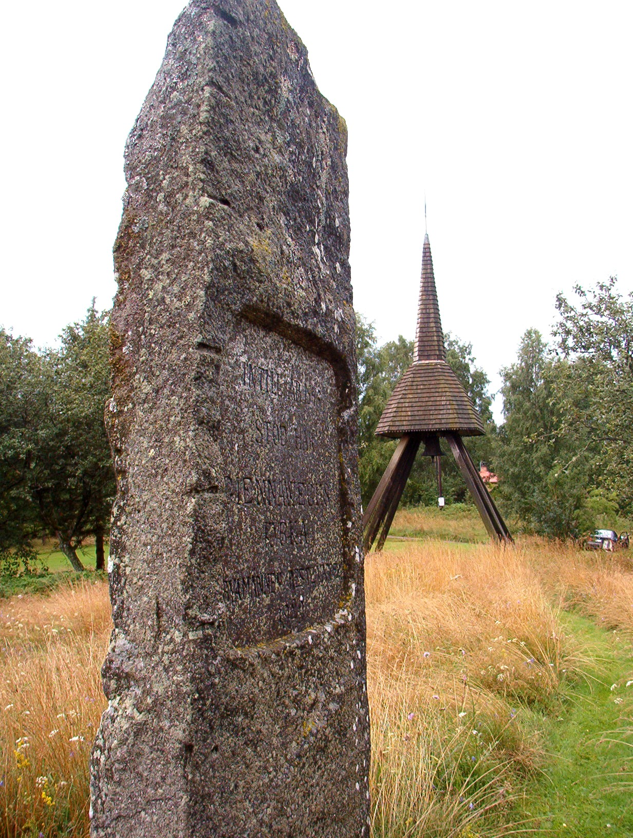 Genneveds kyrkplats i Stora Mellby socken i Bjärke härad i Västergötland. Kyrkplatsen ligger i norra delen av Alingsås kommun i Västra Götalands län, Sverige. date aug 2005